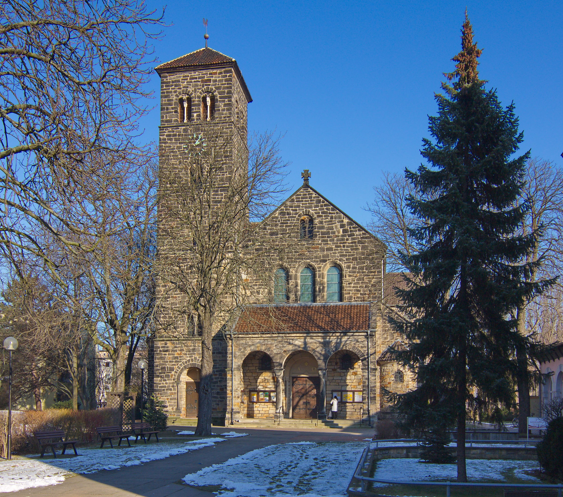 St. Bernward ist die katholische Pfarrkirche von Döhren (1893 geweiht) in Hannover, Niedersachsen, Deutschland.